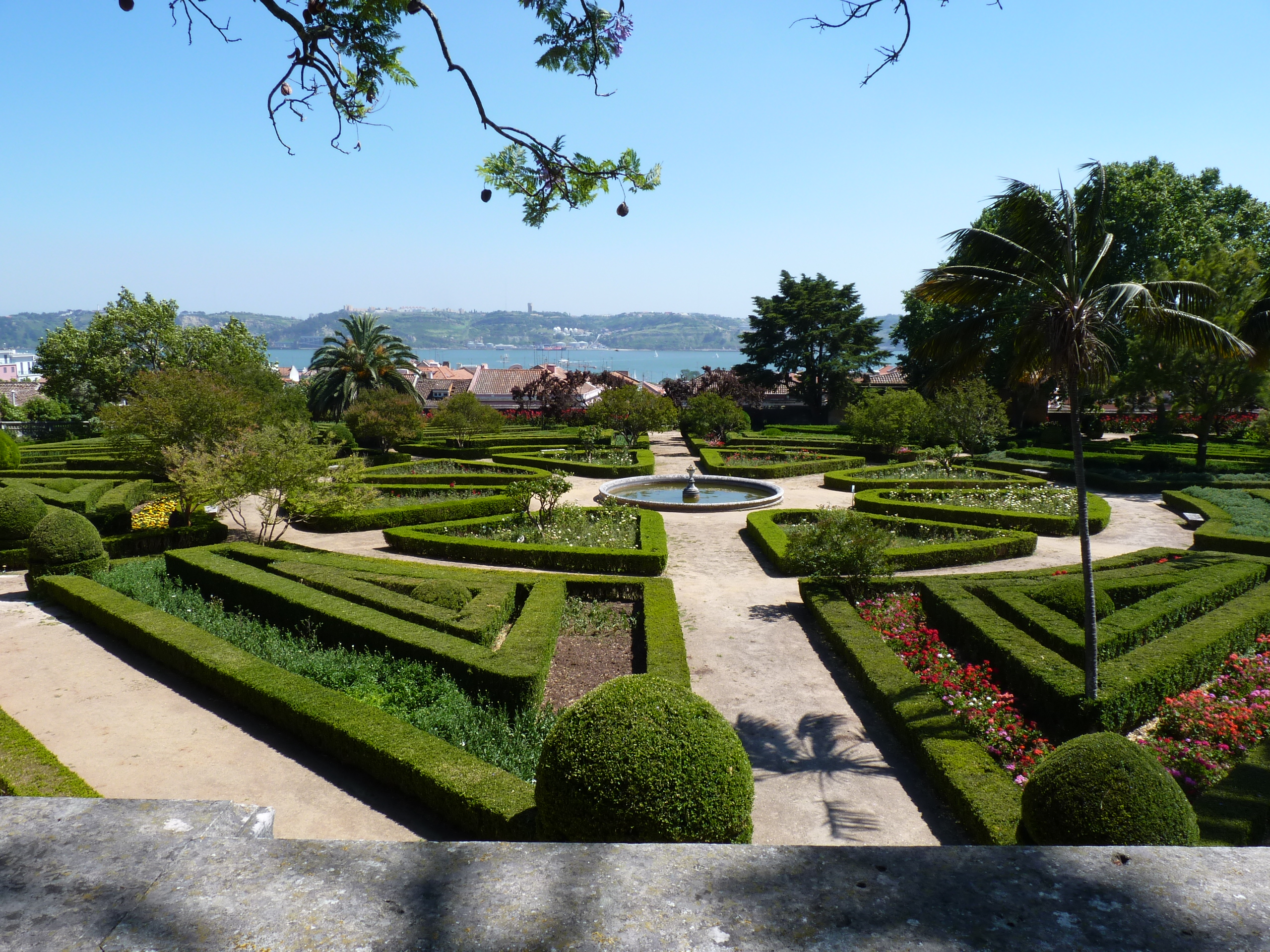 Jardim Botânico da Ajuda This file was uploaded for Wiki Loves Monuments in Portugal with the unique identifier 72758.